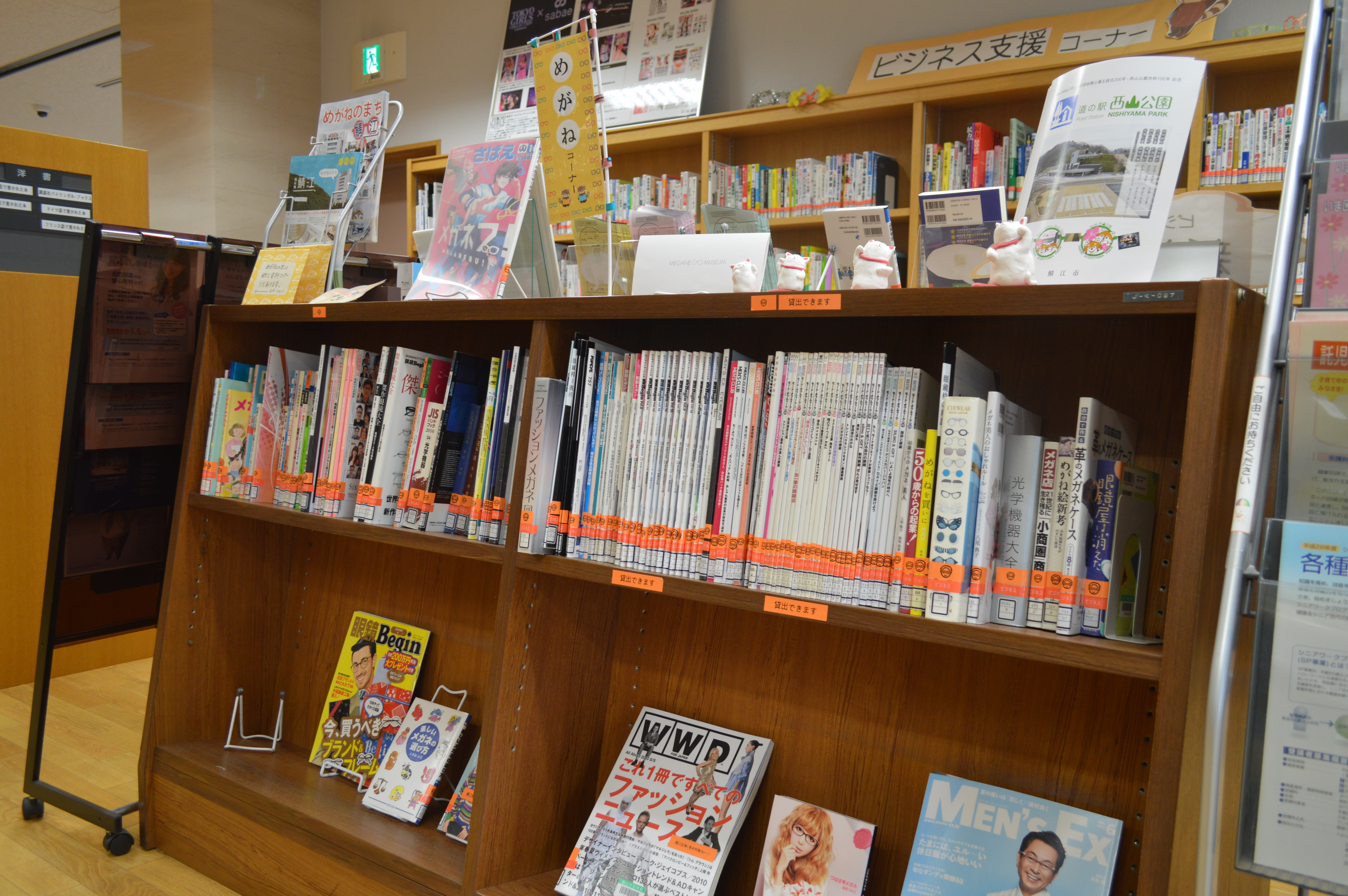 鯖江市図書館。眼鏡コーナー。